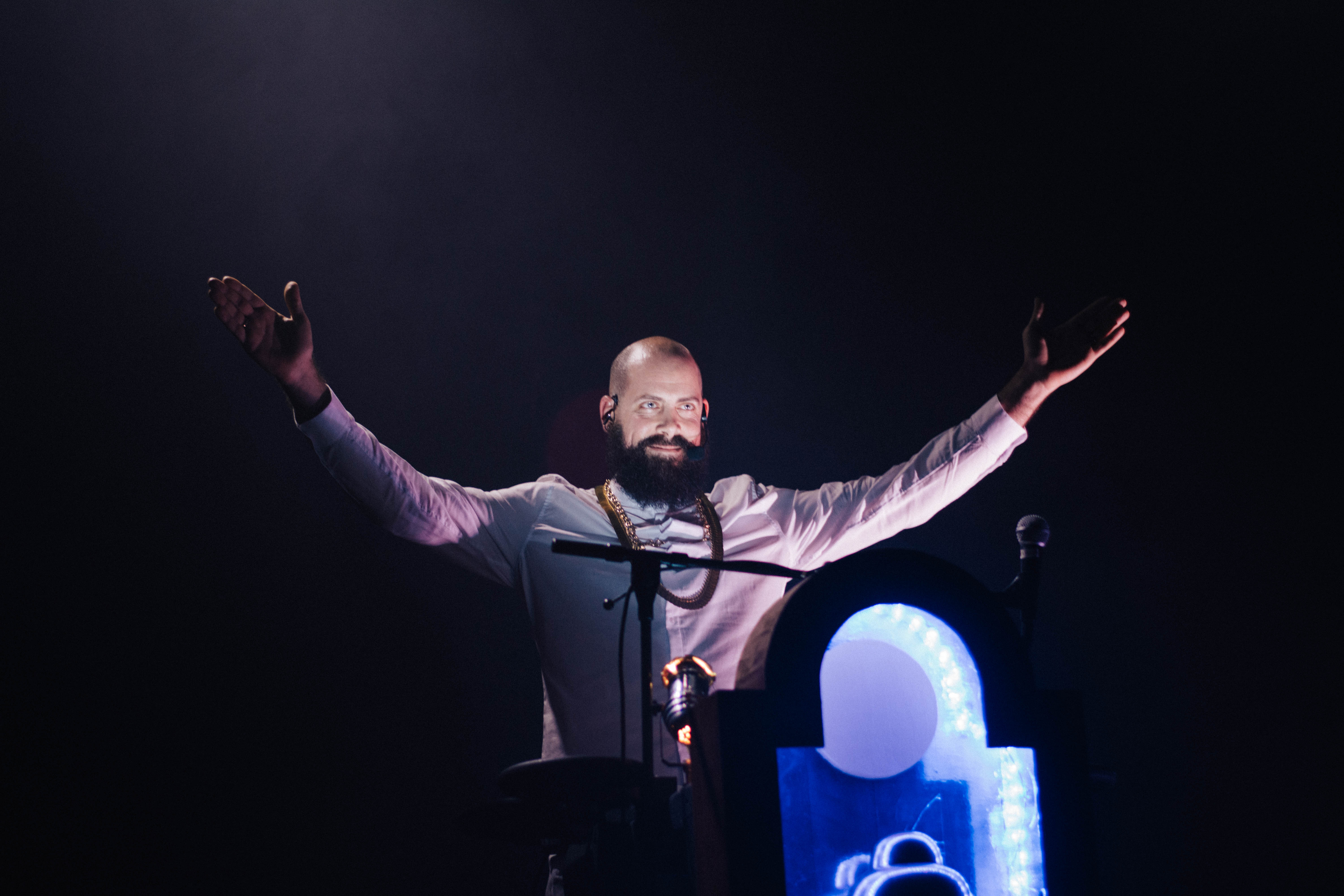 Tanouk 2020